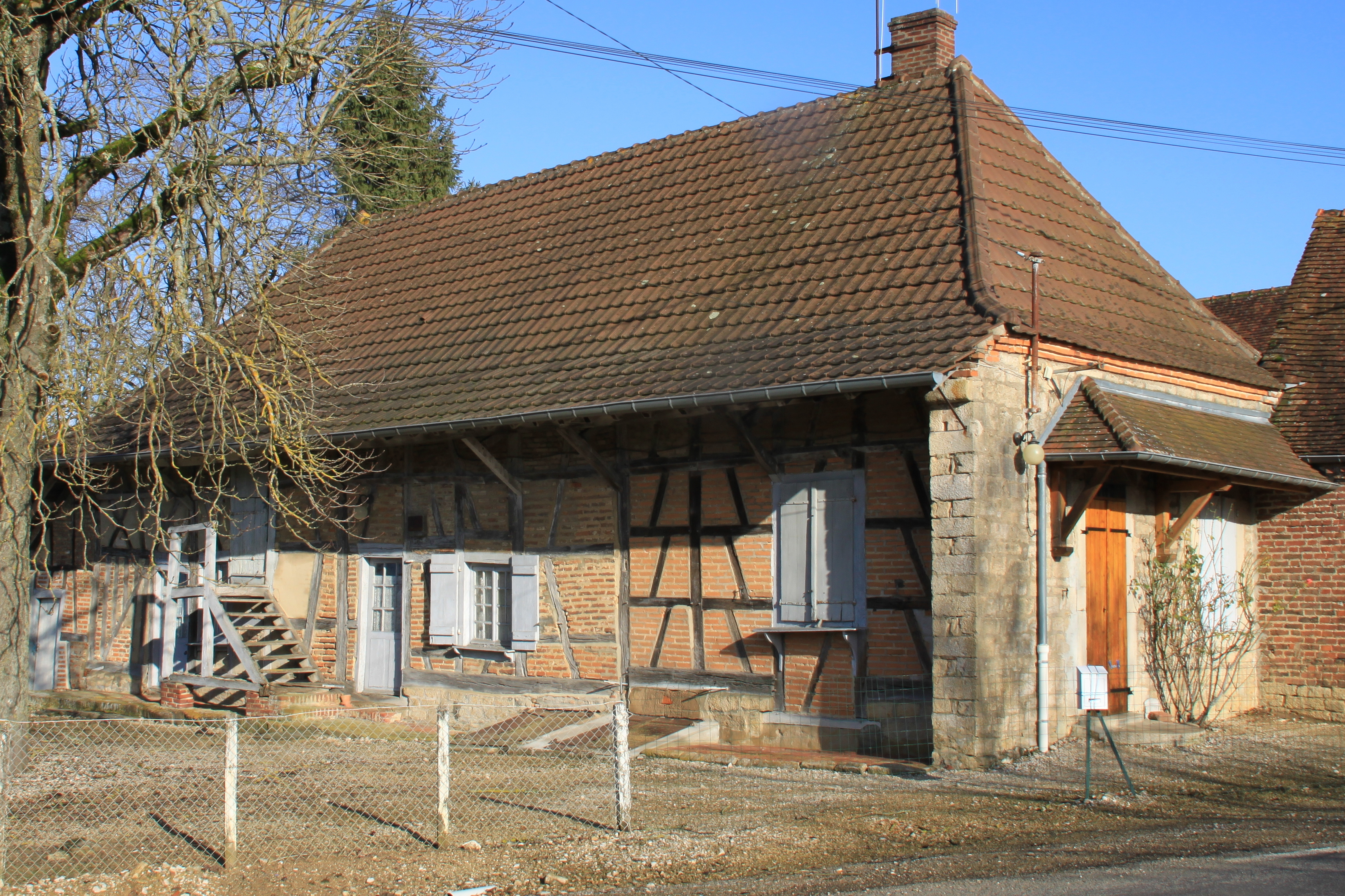 Bressehaus in Sens-sur-Seille (Saône-et-Loire, Frankreich).